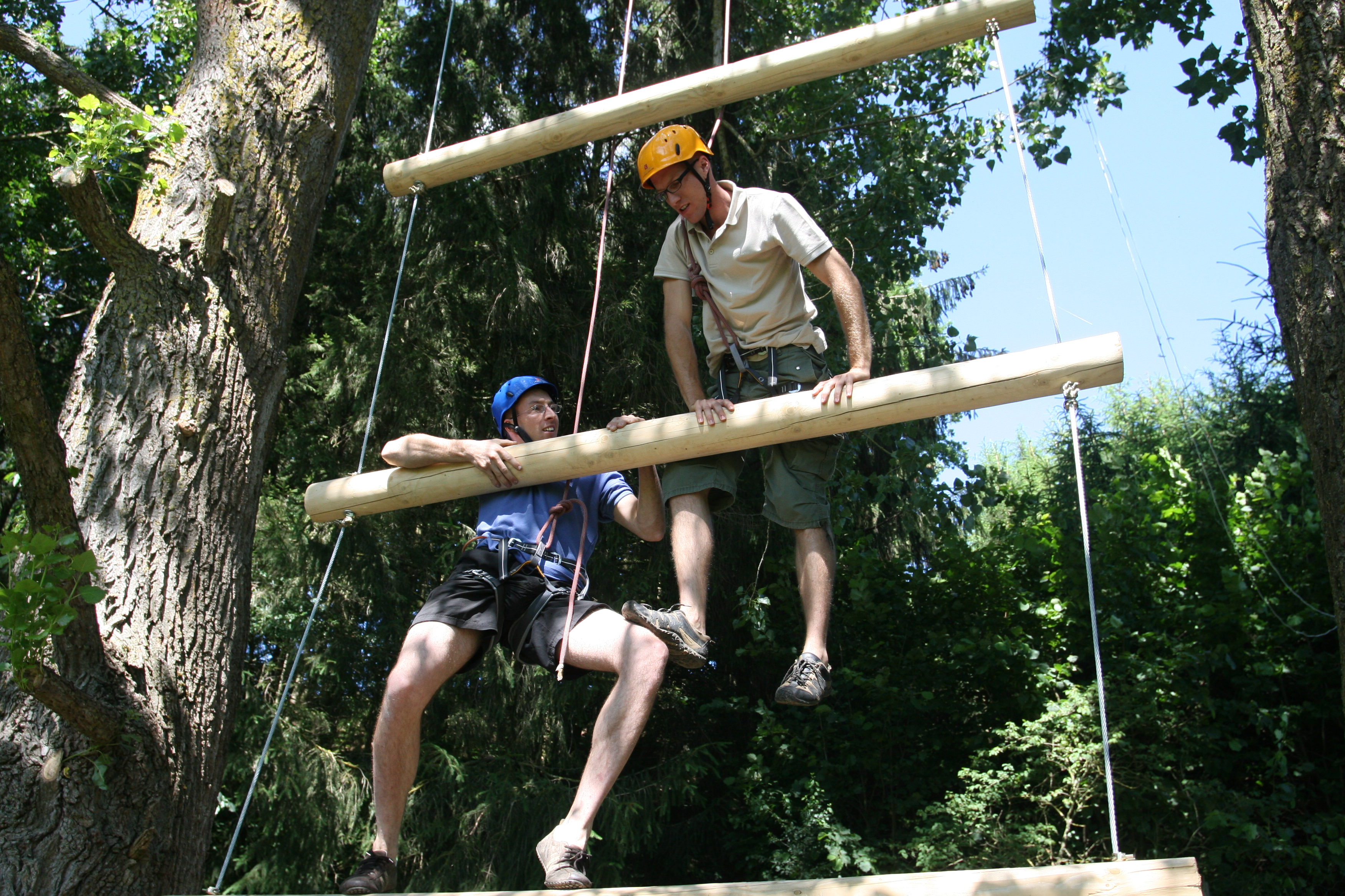 Waldseilgarten Wallenhausen, Karriereleiter, Jakobsleiter